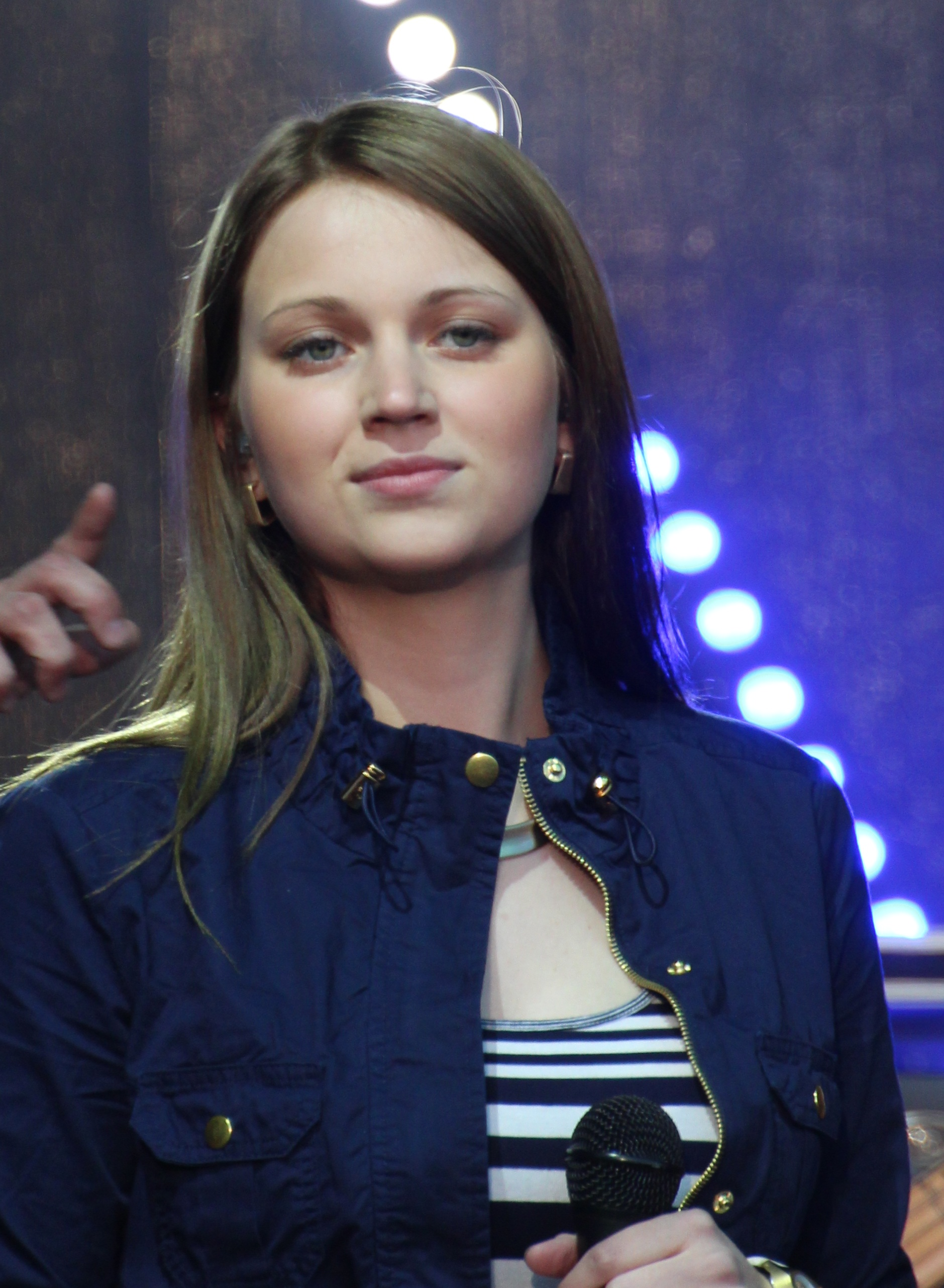 Kerli Kivilaan esinemas koos ansambliga Põhja-Tallinn Vabaduse väljakul Tallinna päeva raames antud kontserdil